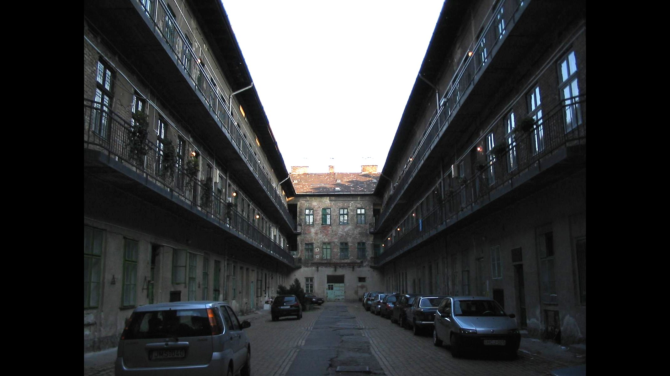 Cour intérieure à Budapest